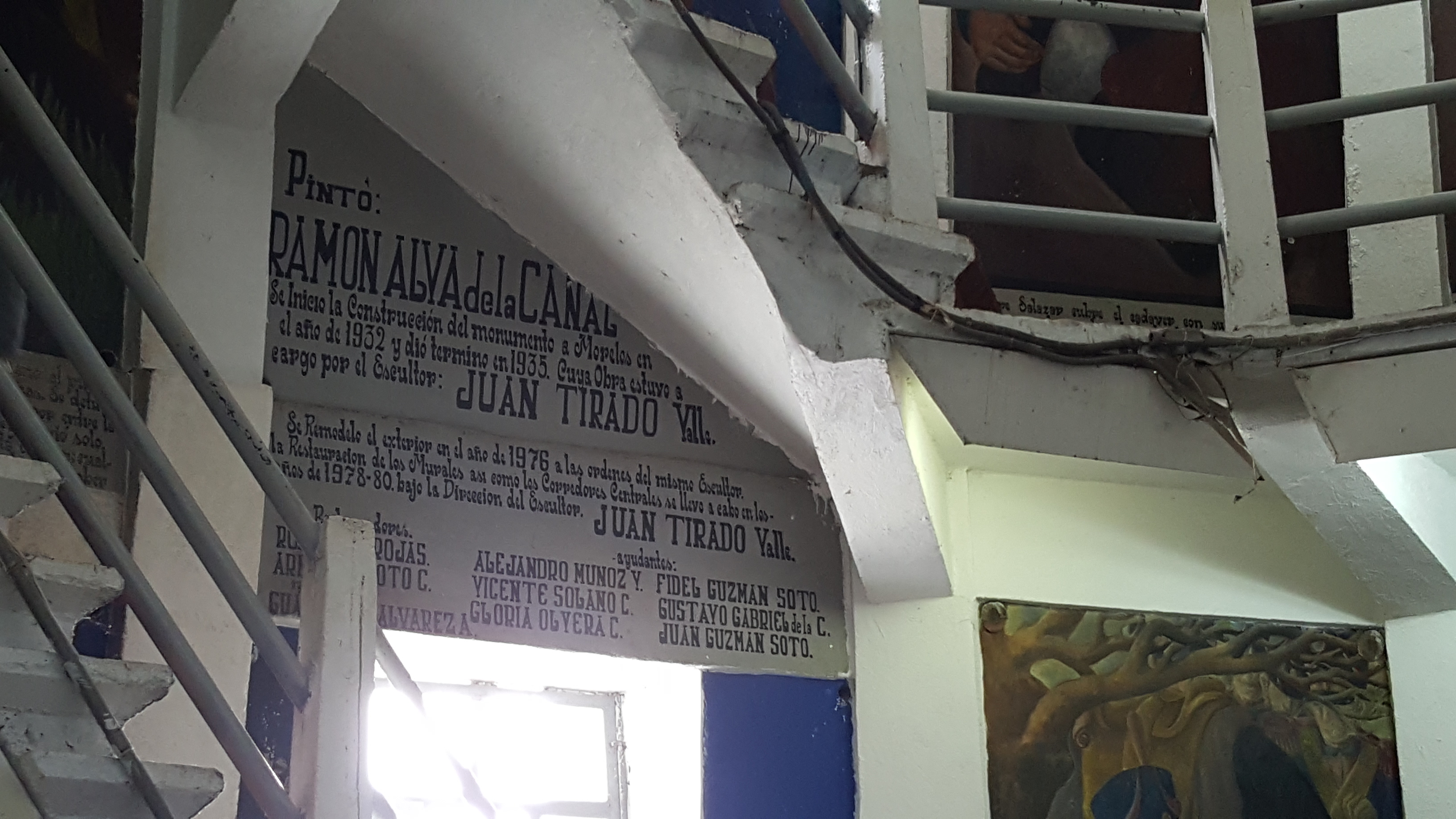 Firma de los pintores del Monumento a José María Morelos